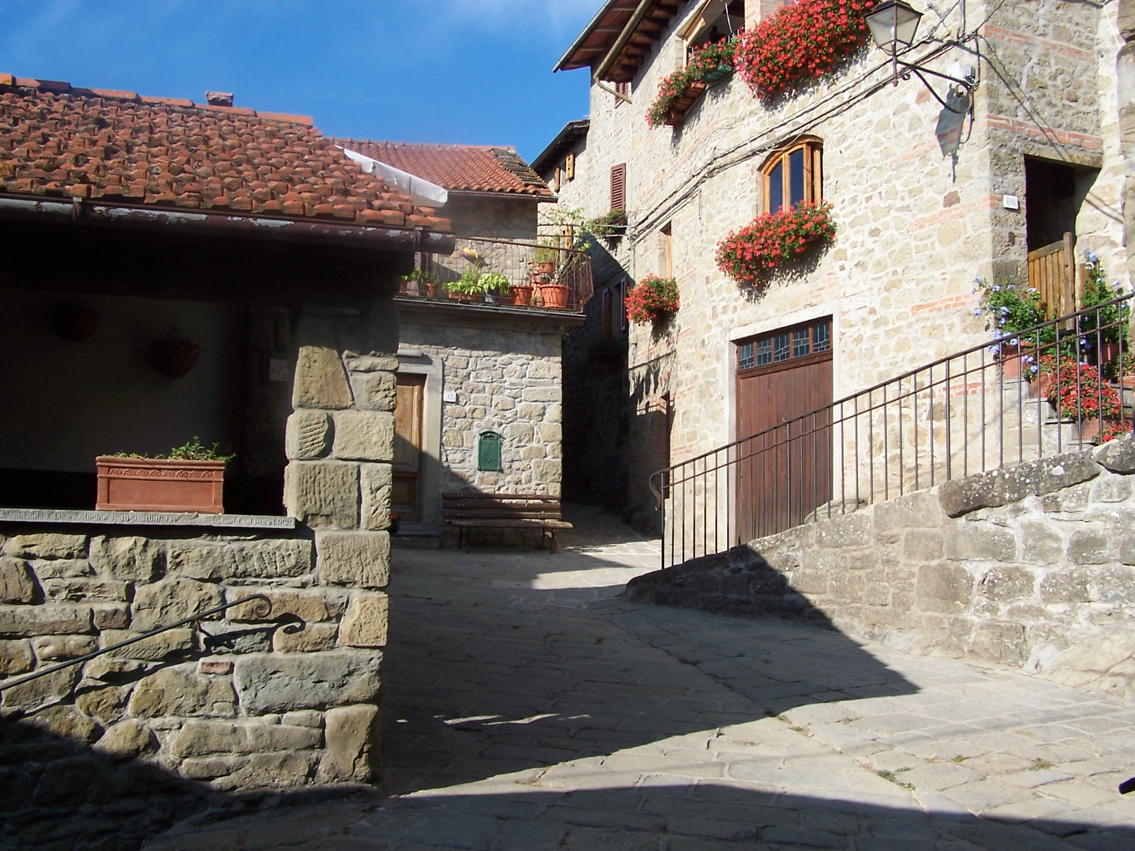 Immagine del paese di Quota di Poppi, Poppi (AR)